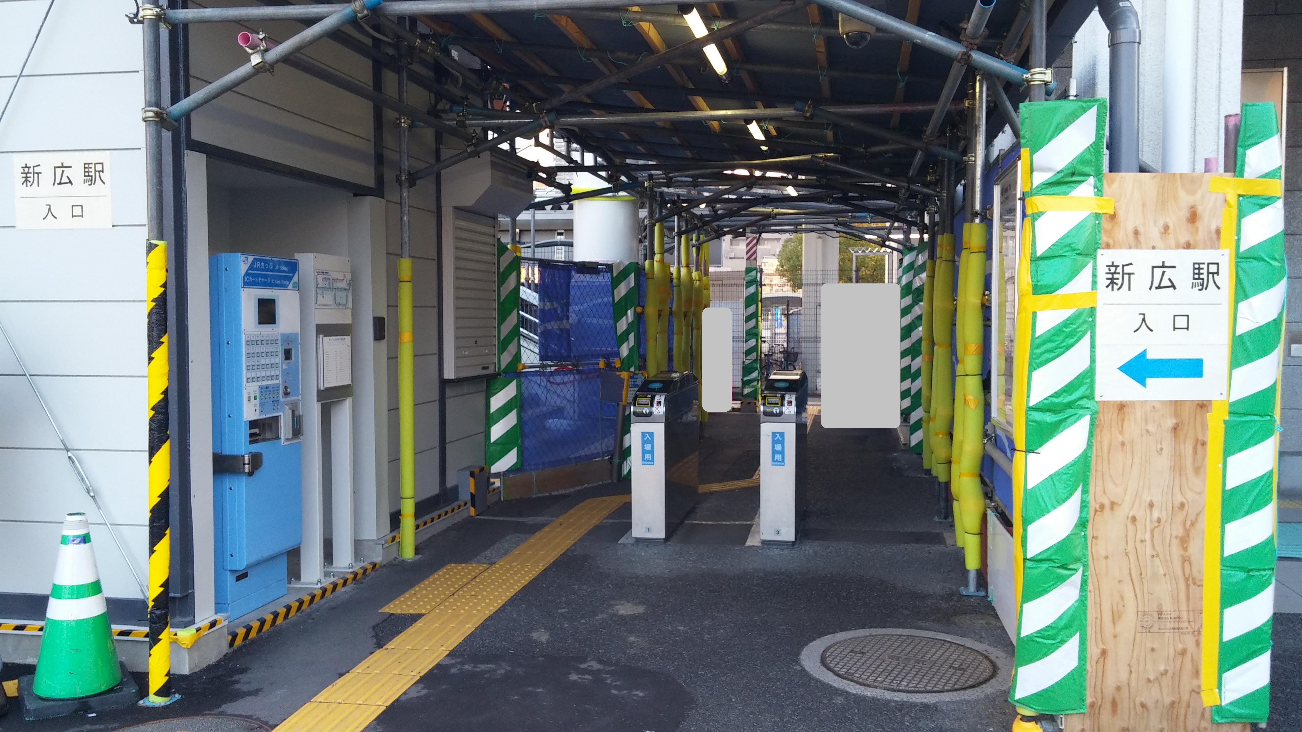 JR新広駅改札口（仮駅舎）